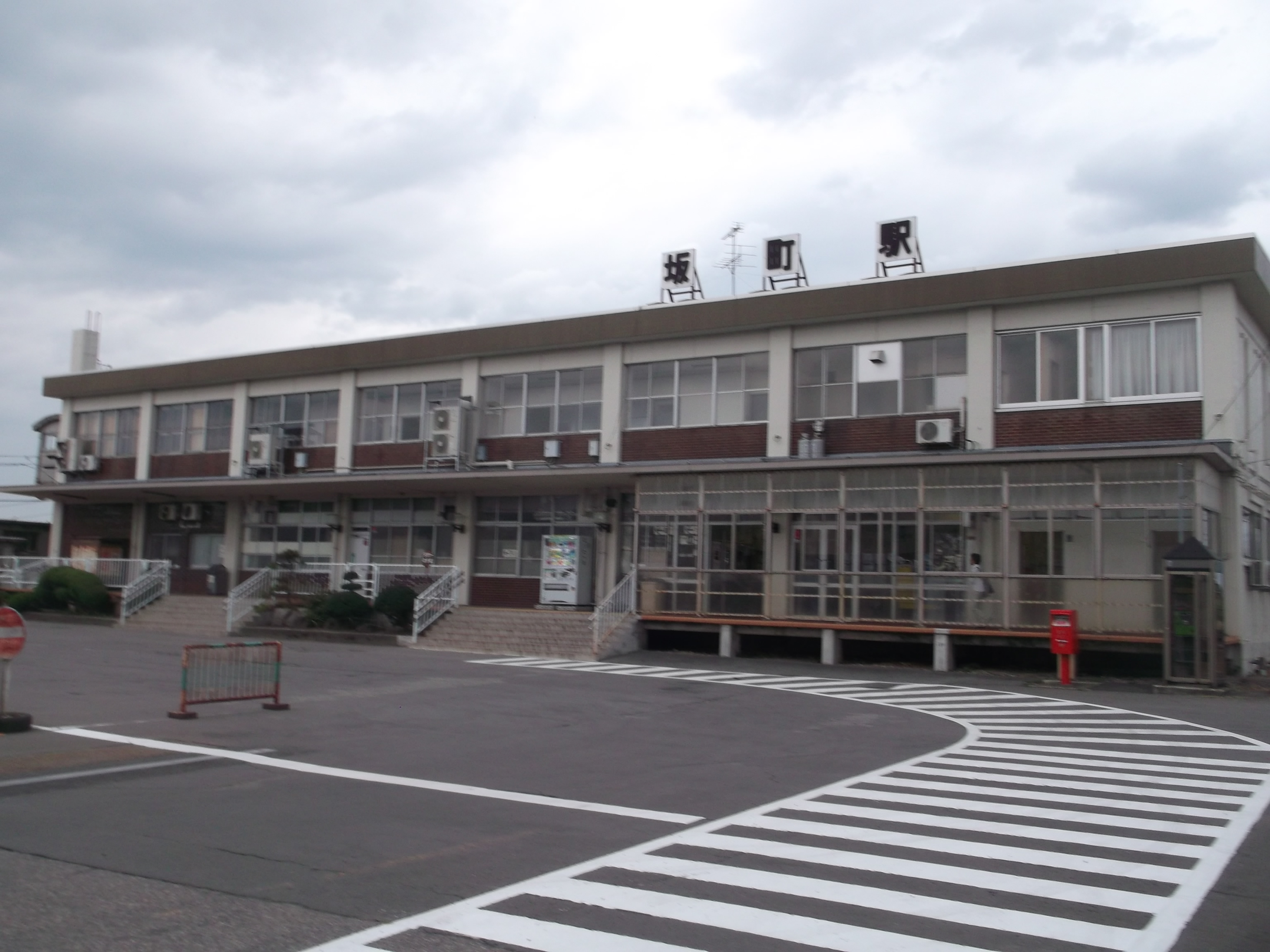 JR坂町駅